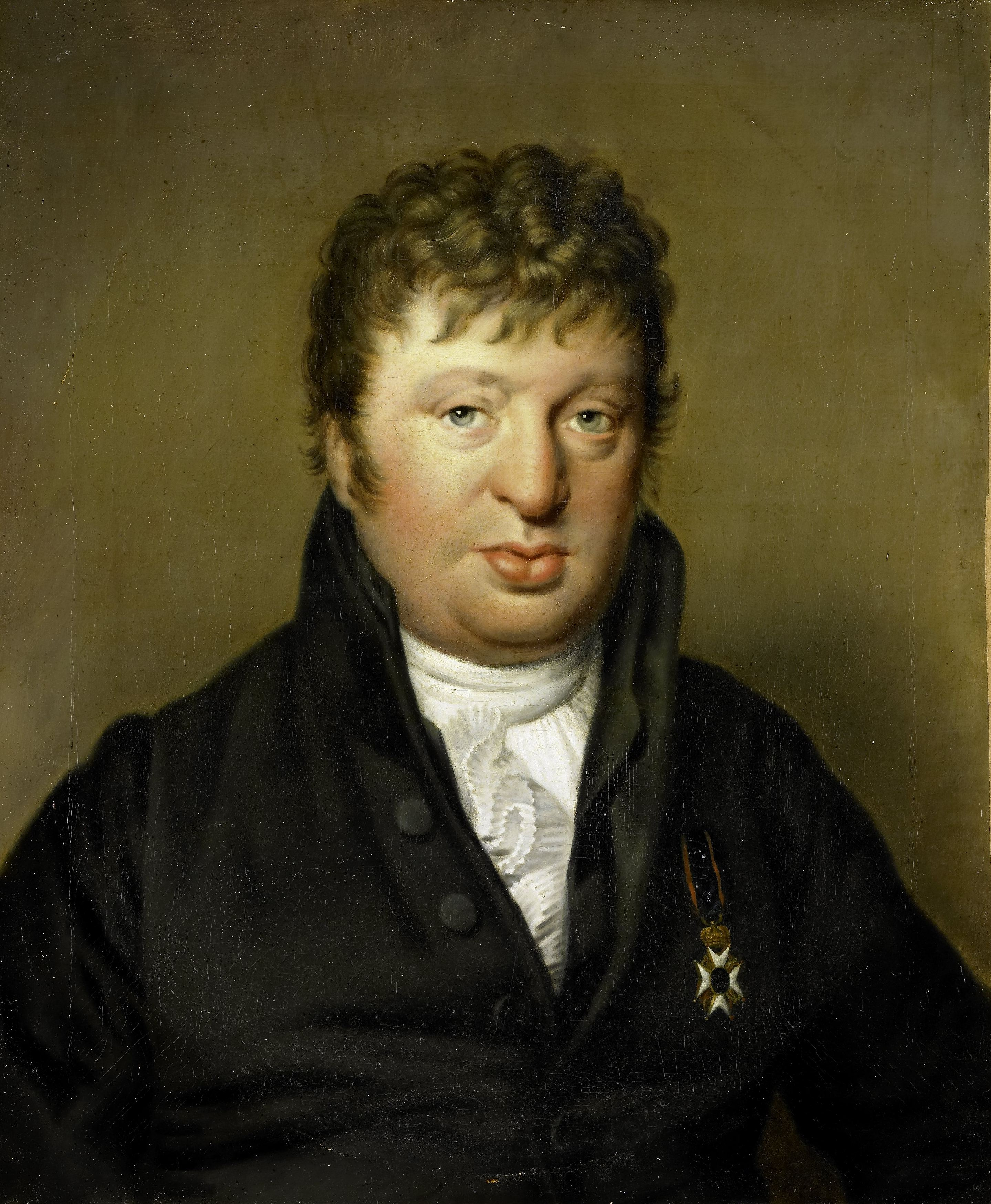 Portret van Jacobus Scheltema, geschiedschrijver. Buste, en face. Kopie door Idsinga naar het origineel door Van der Kooi.